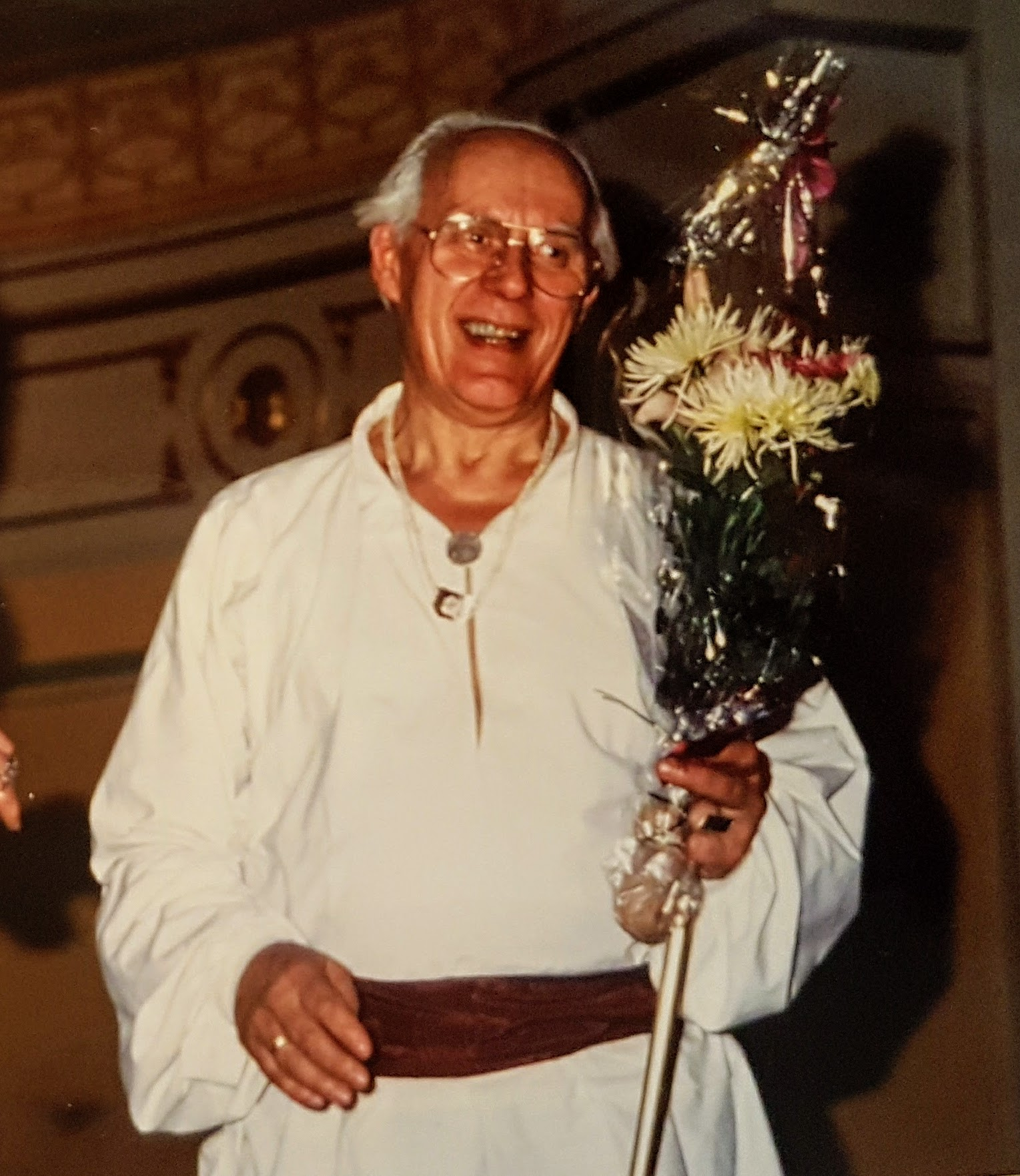 Reidar Warme på scenen i Gamle Logen, Oslo. Operaballet 1992